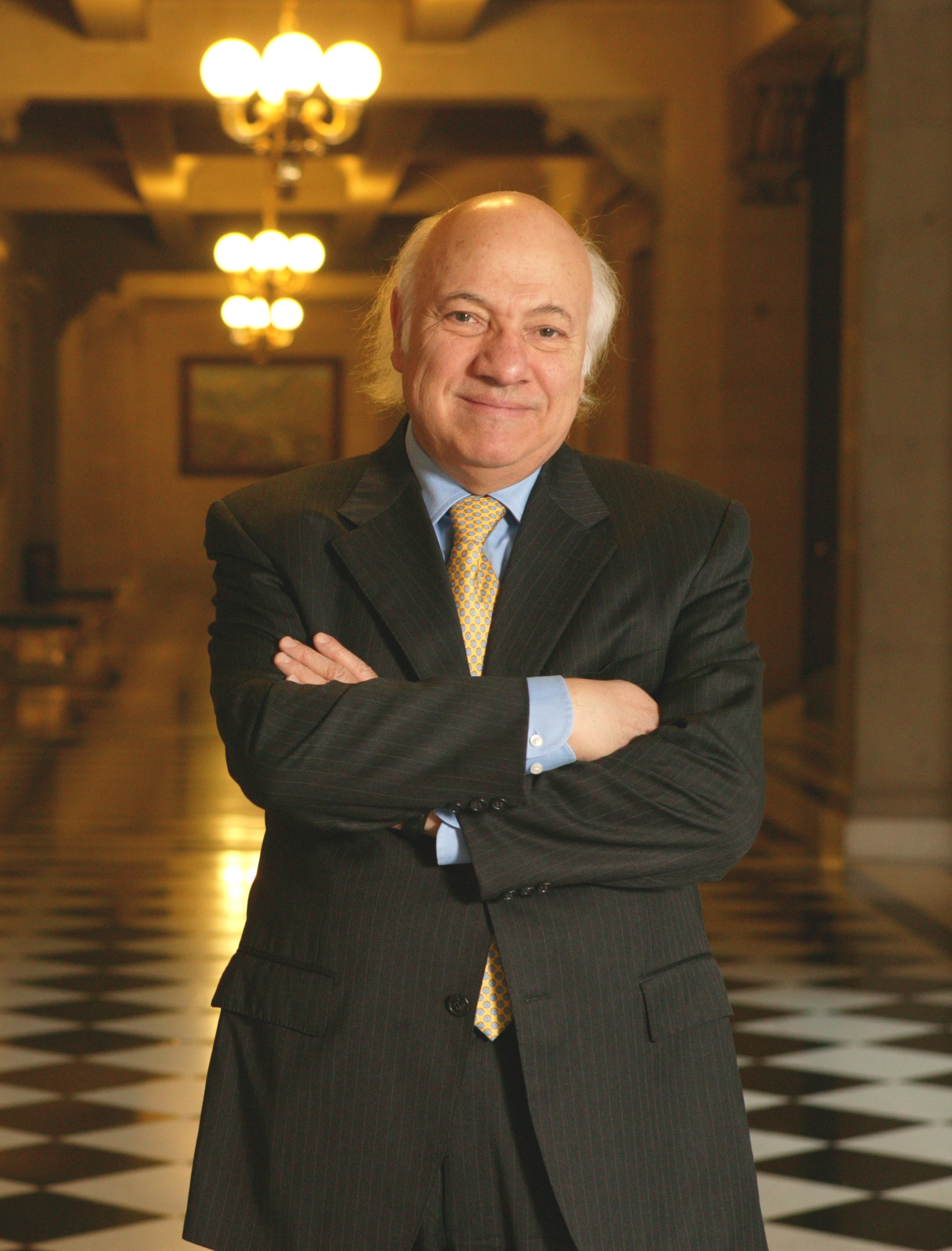 Vittorio Corbo L.